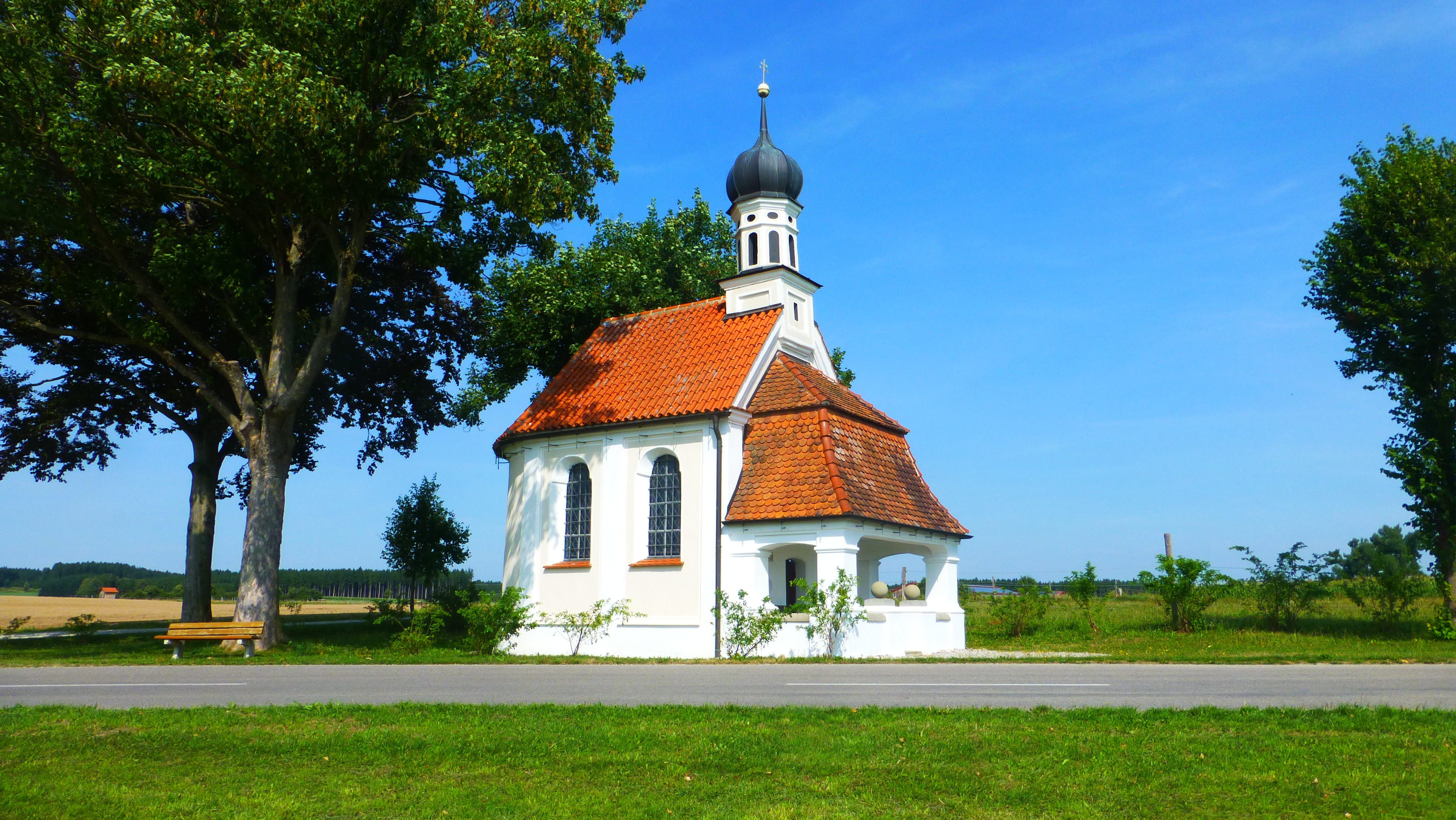 Kapelle zur Allerheiligsten Dreifaltikeit in Gutenberg (Oberostendorf)